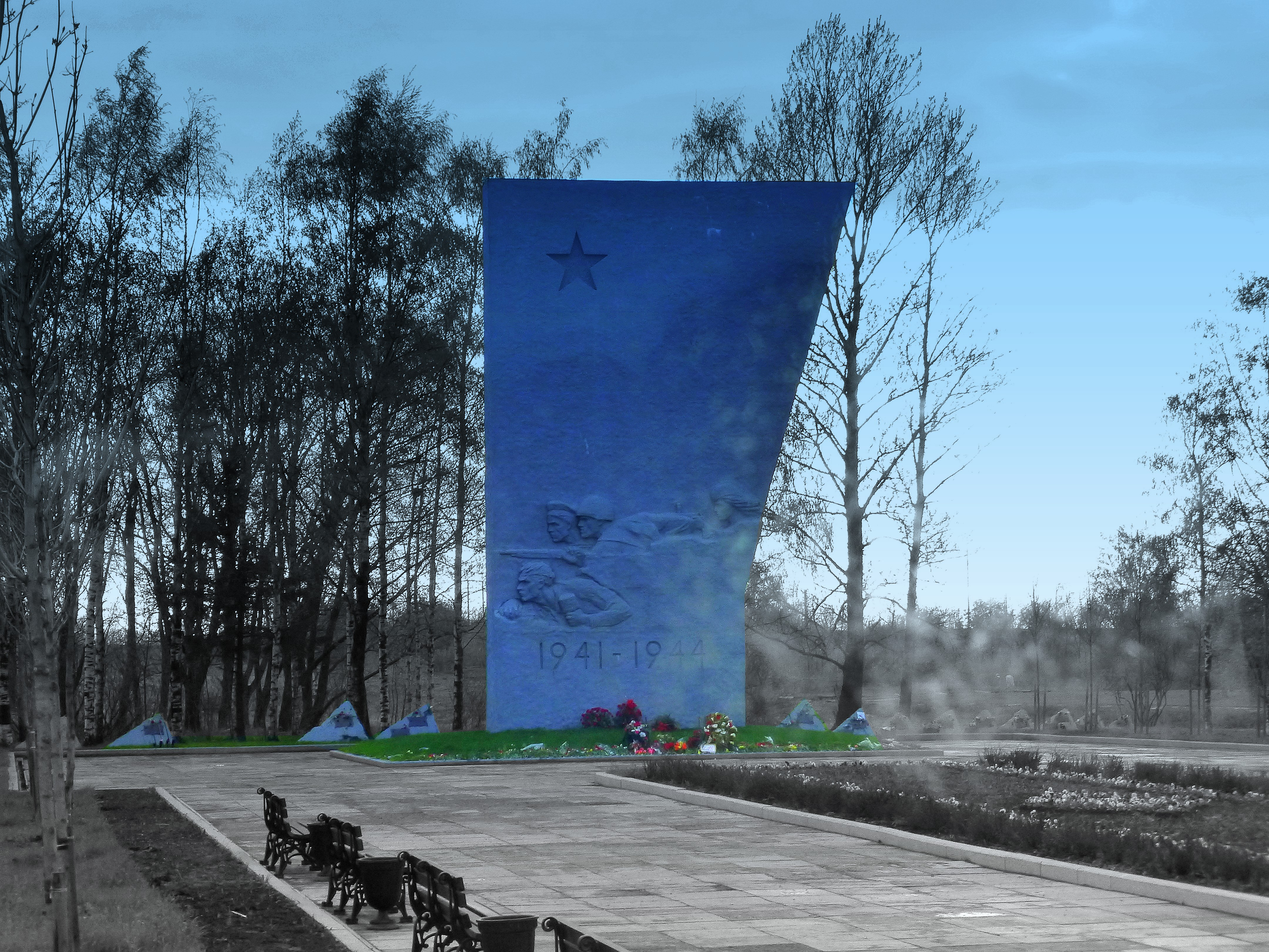 St. Petersburg - Monument to the Heroic Defenders of Leningrad --- Монумент Героическим защитникам Ленинграда